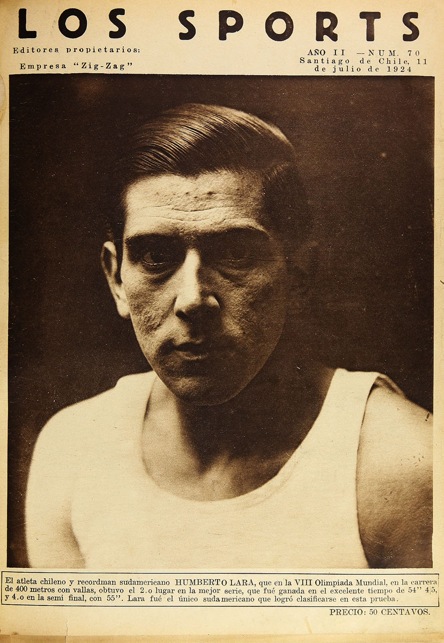 Los Sports, número 70, 11 de julio de 1924